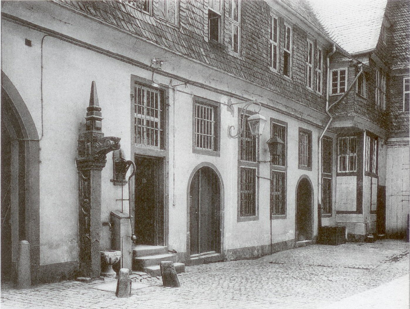 Frankfurt am Main, Germany. Innenhof des Saalhofes um 1900